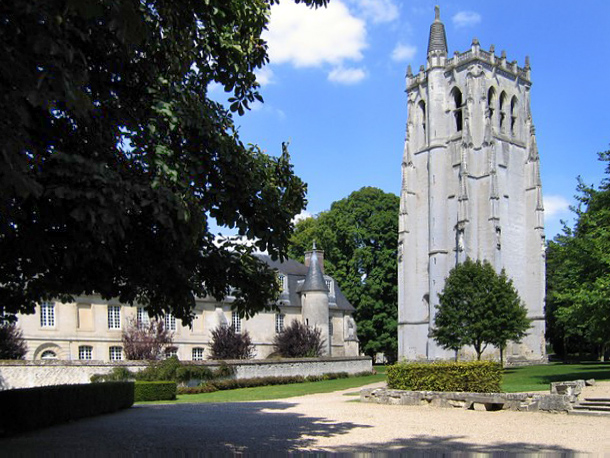 Abbaye du Bec Hellouin, Eure, Haute Normandie, France